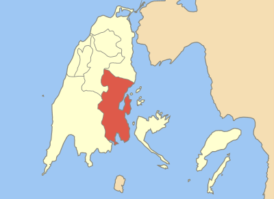 Locator map of Ellomenos municipality (Δήμος Ελλομένου) in Lefkada prefecture (Νομός Λευκάδας) in Greece.